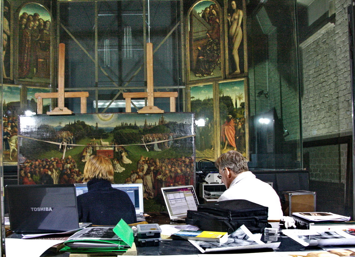 Treballs d'anàlisi espectrogràfic durant la restauració de l'Adoració de l'Anyell Mística a la catedral de Sant Bavó, Gant (1910).